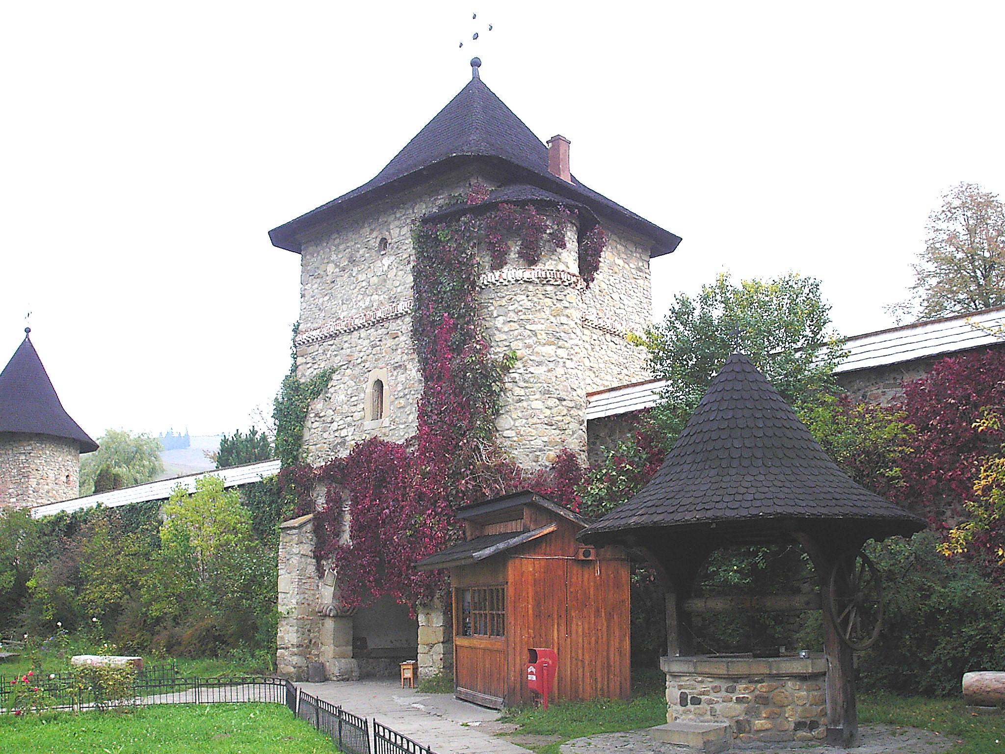 Moldoviţa: Kolostoregyüttes kaputornya